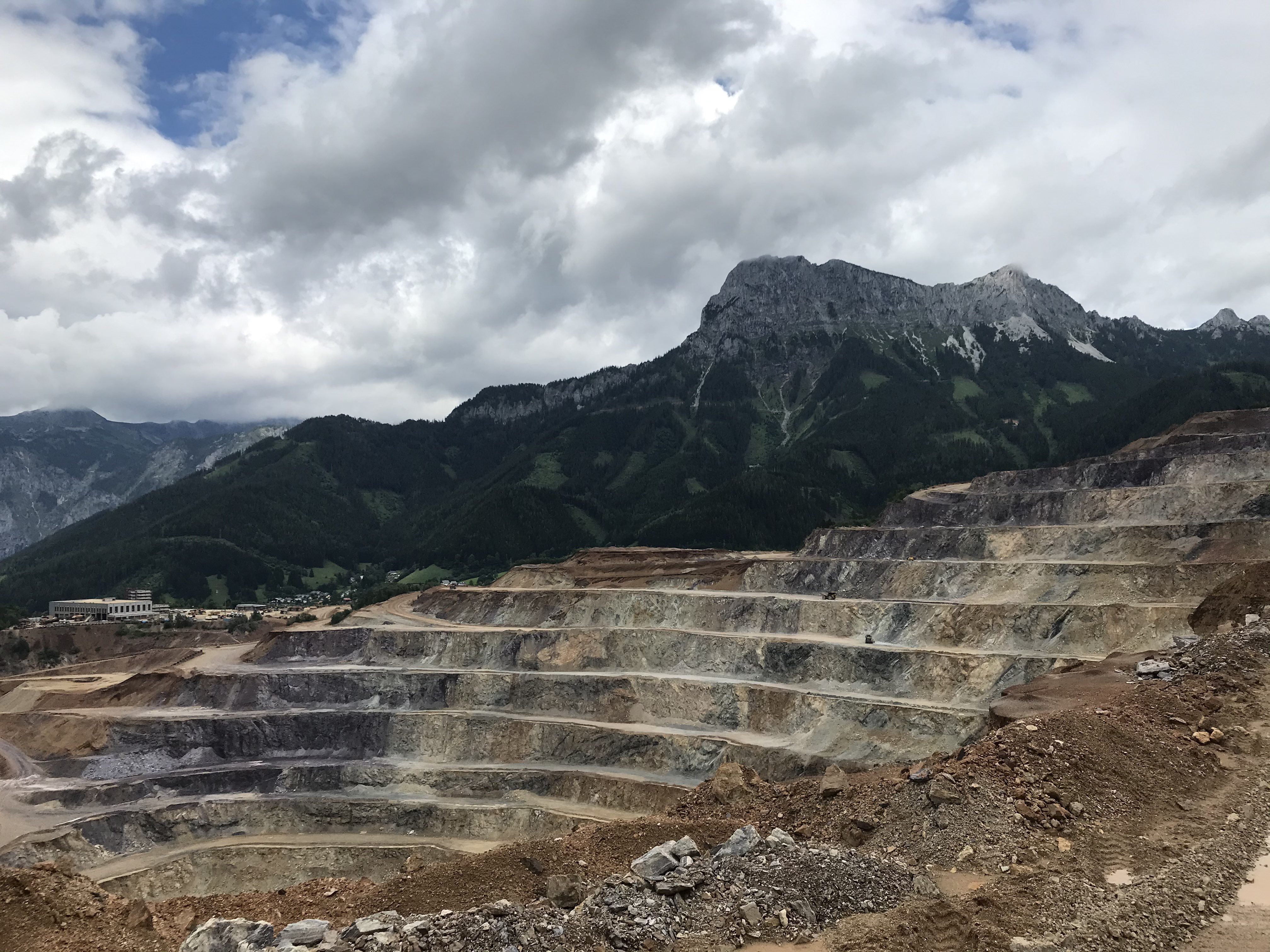 Erzberg in Eisenerz, Steiermark